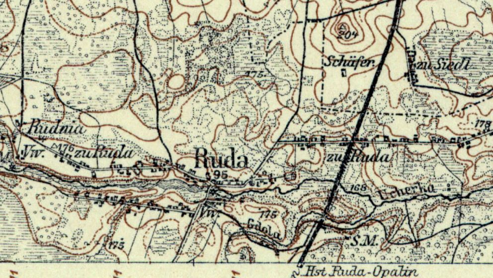 Ruda (pow. chełmski) na mapie Rosji Zachodniej (Karte des westlichen Rußlands) z 1915 r.